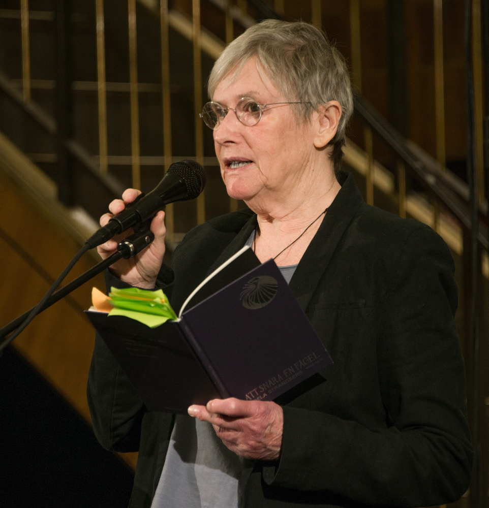 Ingela Strandberg på Poesimässan på Stockholms Stadsbibliotek den 23 mars 2018.